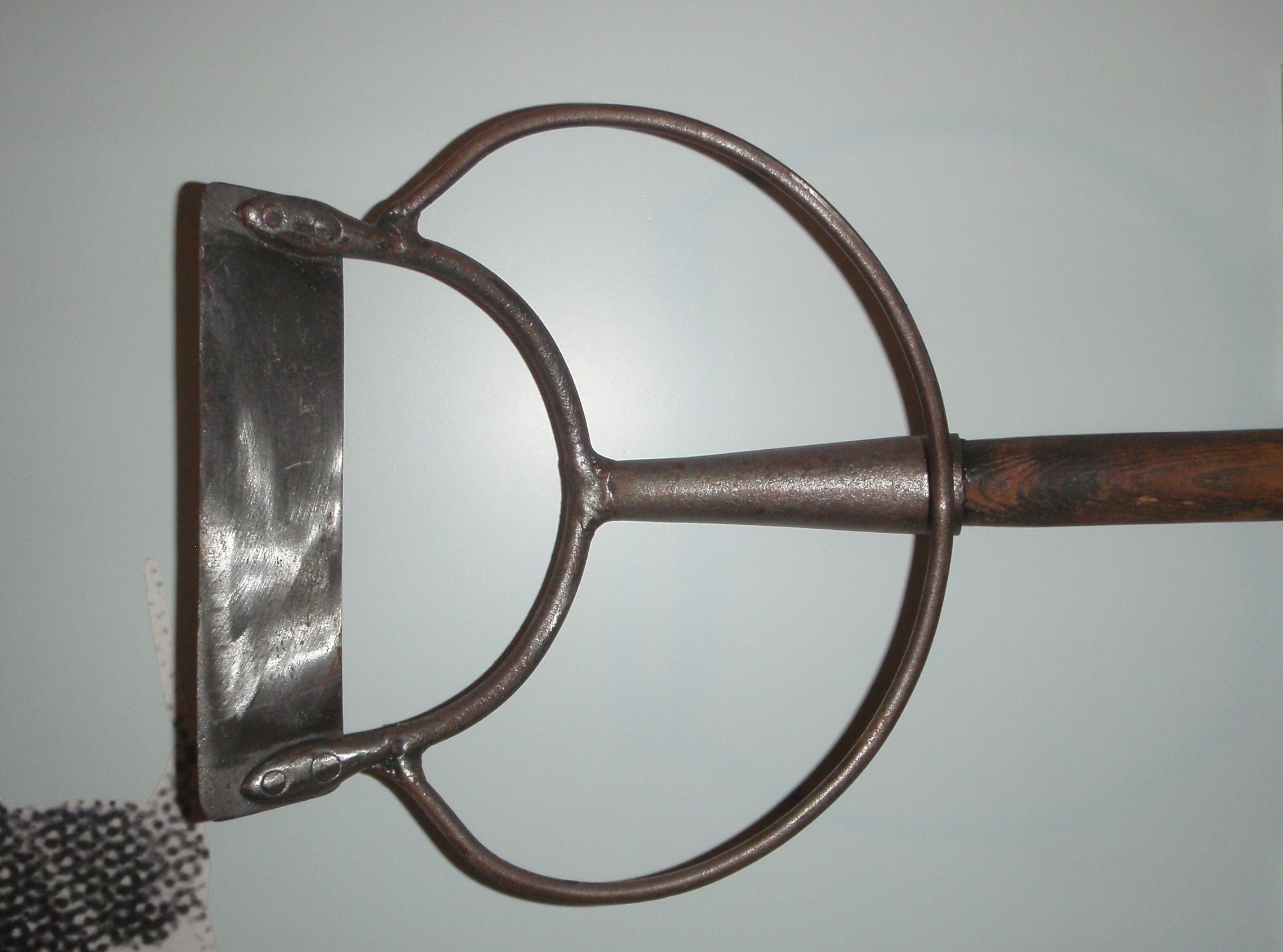 Köpfschippe zur Rübenernte